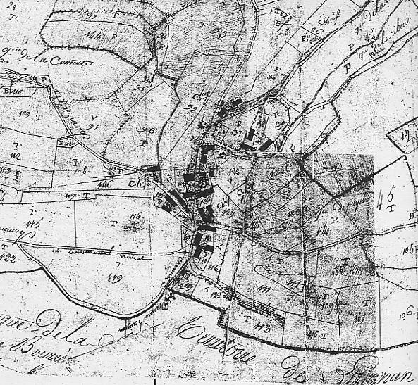 Extrait du plan cadastral de 1809 du centre du village de Bourréac (Hautes Pyrénées)